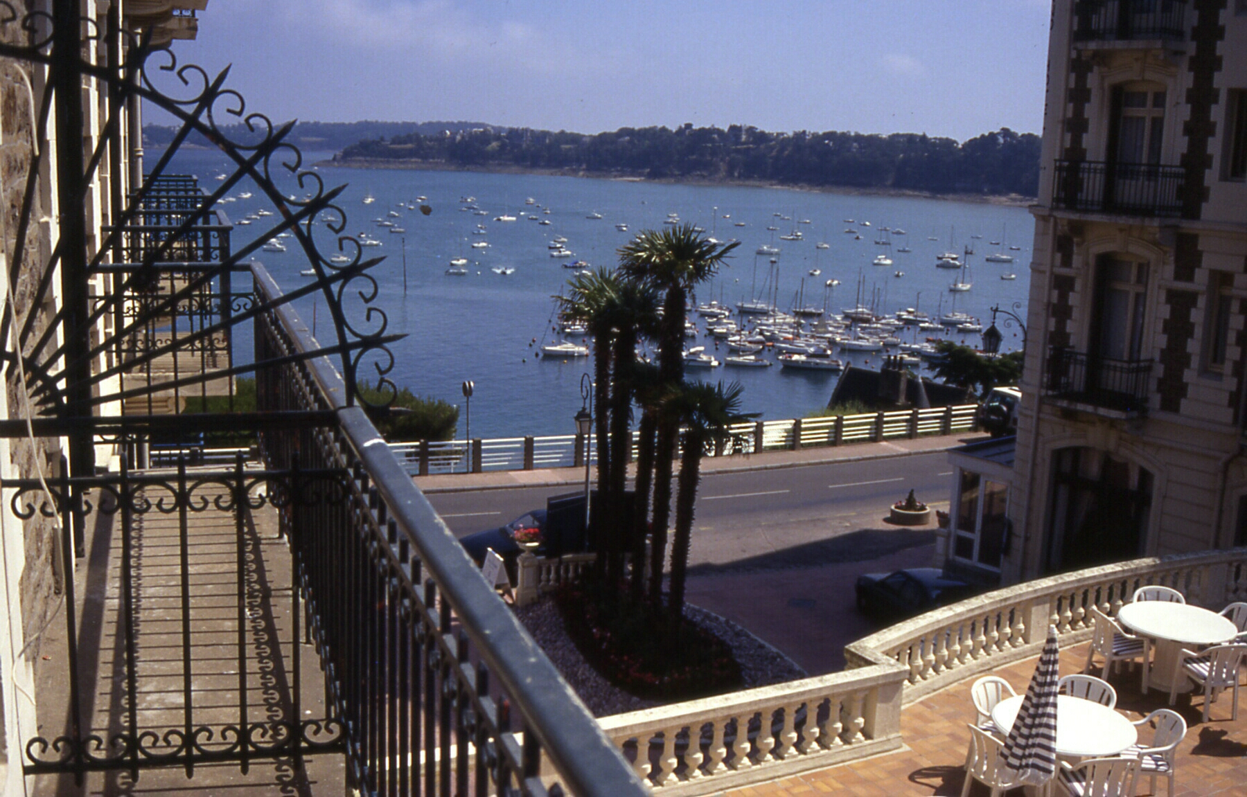 Dinard Blick auf Antlantik